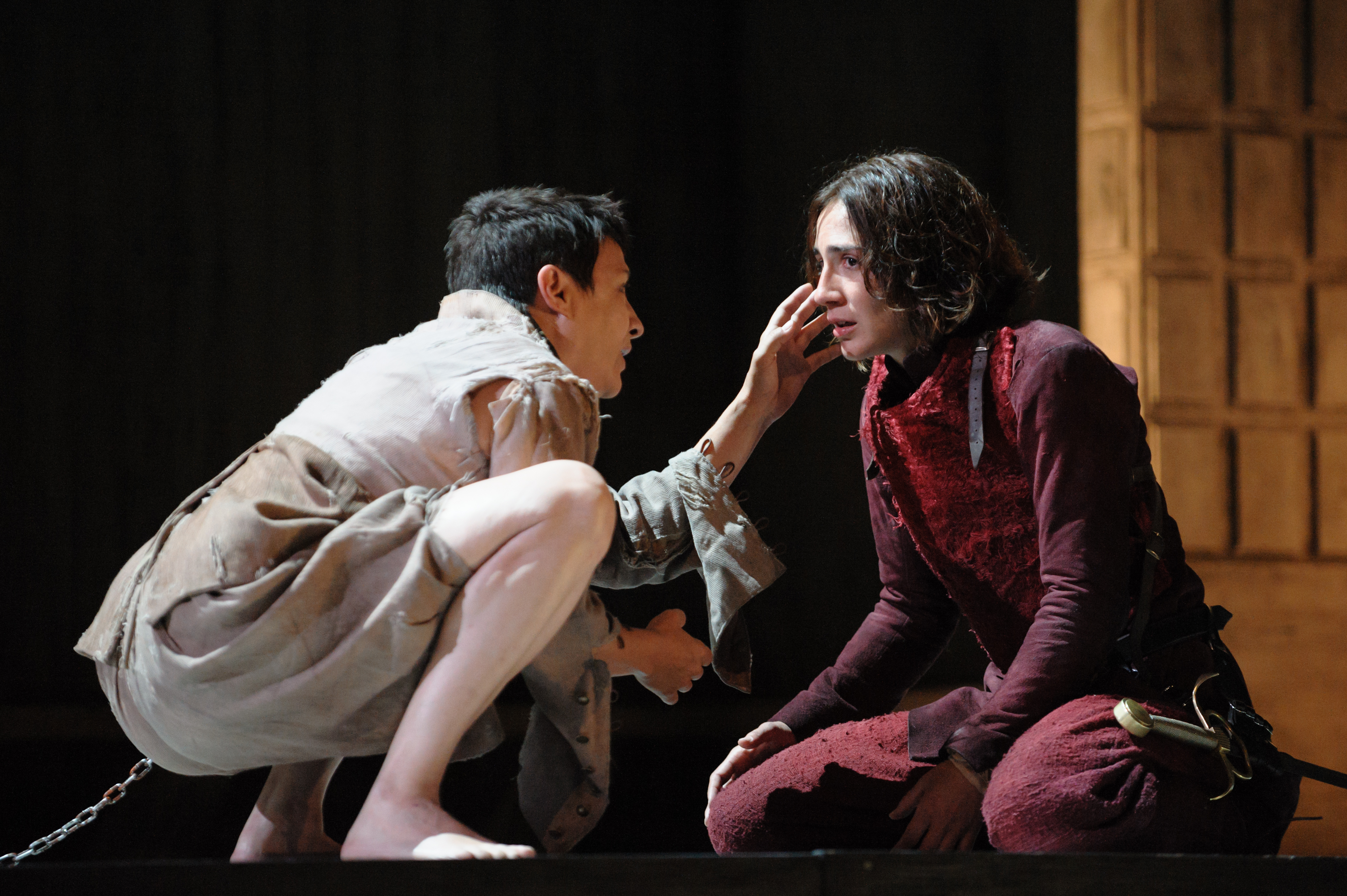 La vida es sueño. 35 edición del Festival de Teatro Clásico de Almagro. Datos de la obra Título: La vida es sueño Autor: Calderón de la Barca Versión: Juan Mayorga Dirección: Helena Pimenta Cía: Compañía Nacional de Teatro Clásico Foto: Guillermo Casas